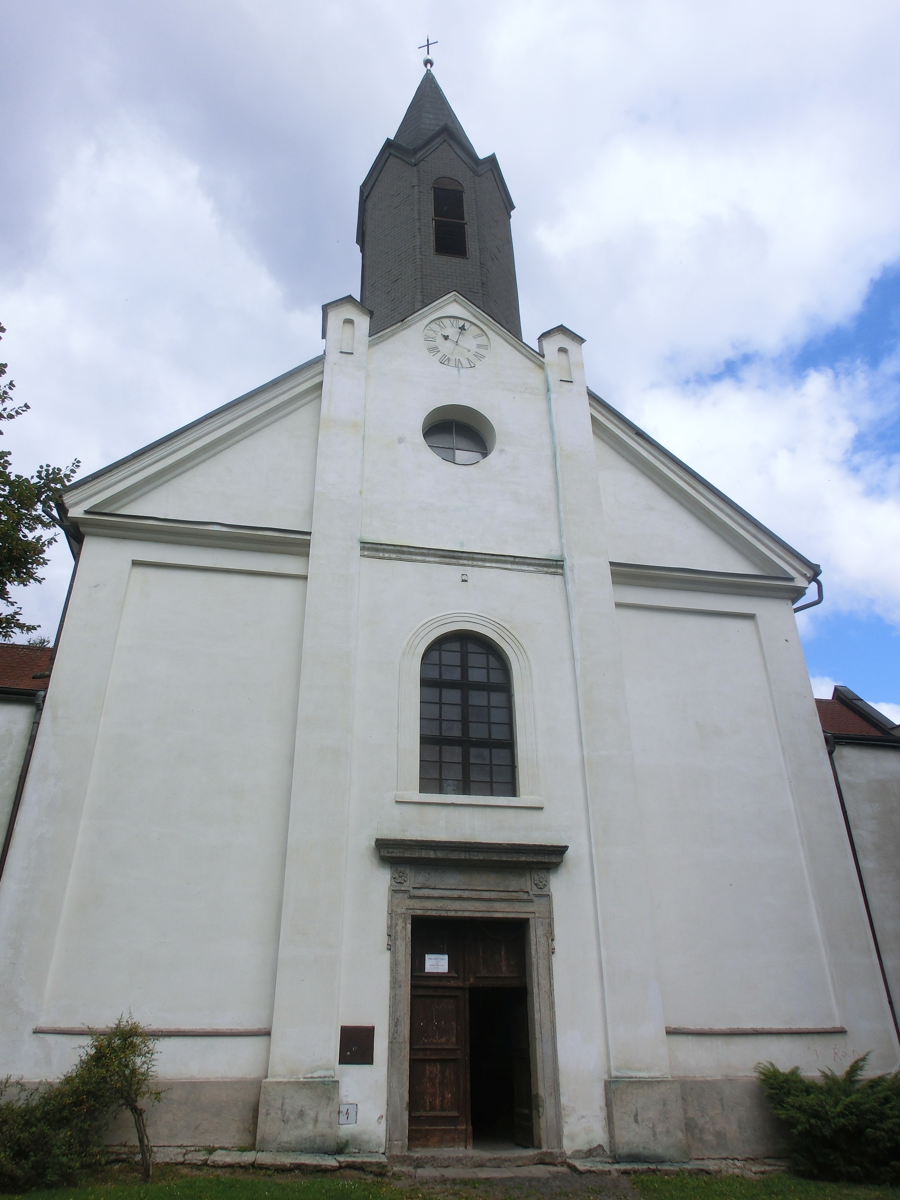 Pohled na průčelí kostela Nejsvětější Trojice v Jílovém u Děčína